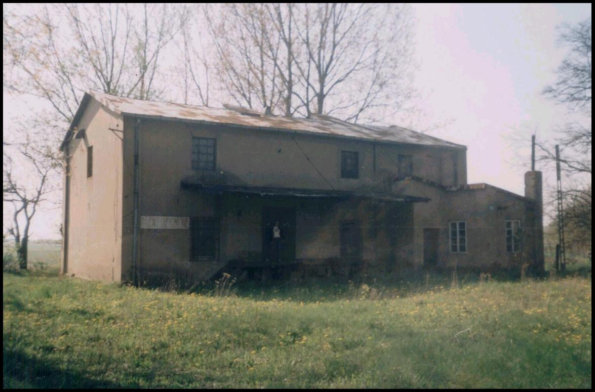 Młyn w Ożarowie